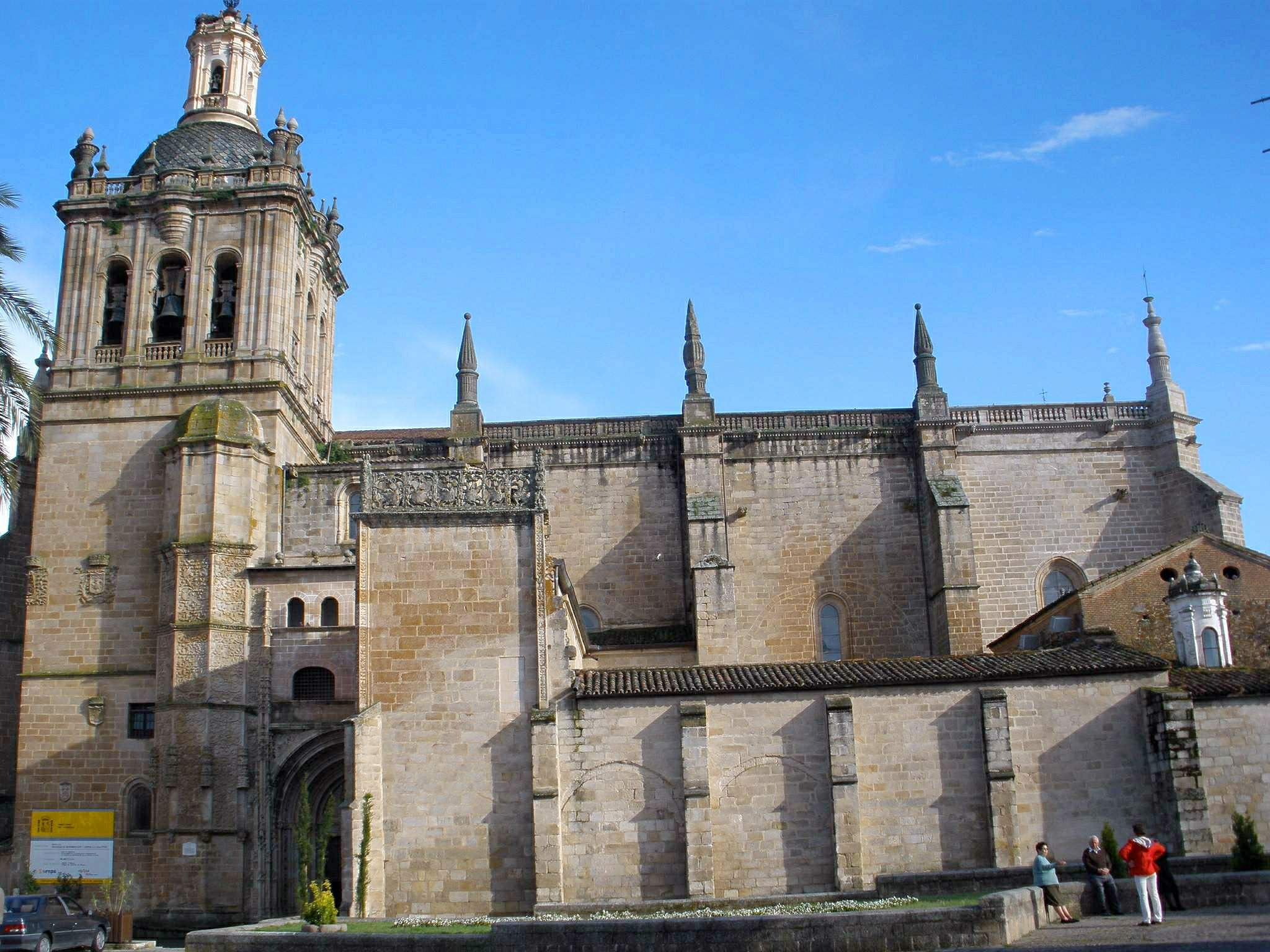 Catedral de la Asunción de de Coria (provincia de Cáceres)